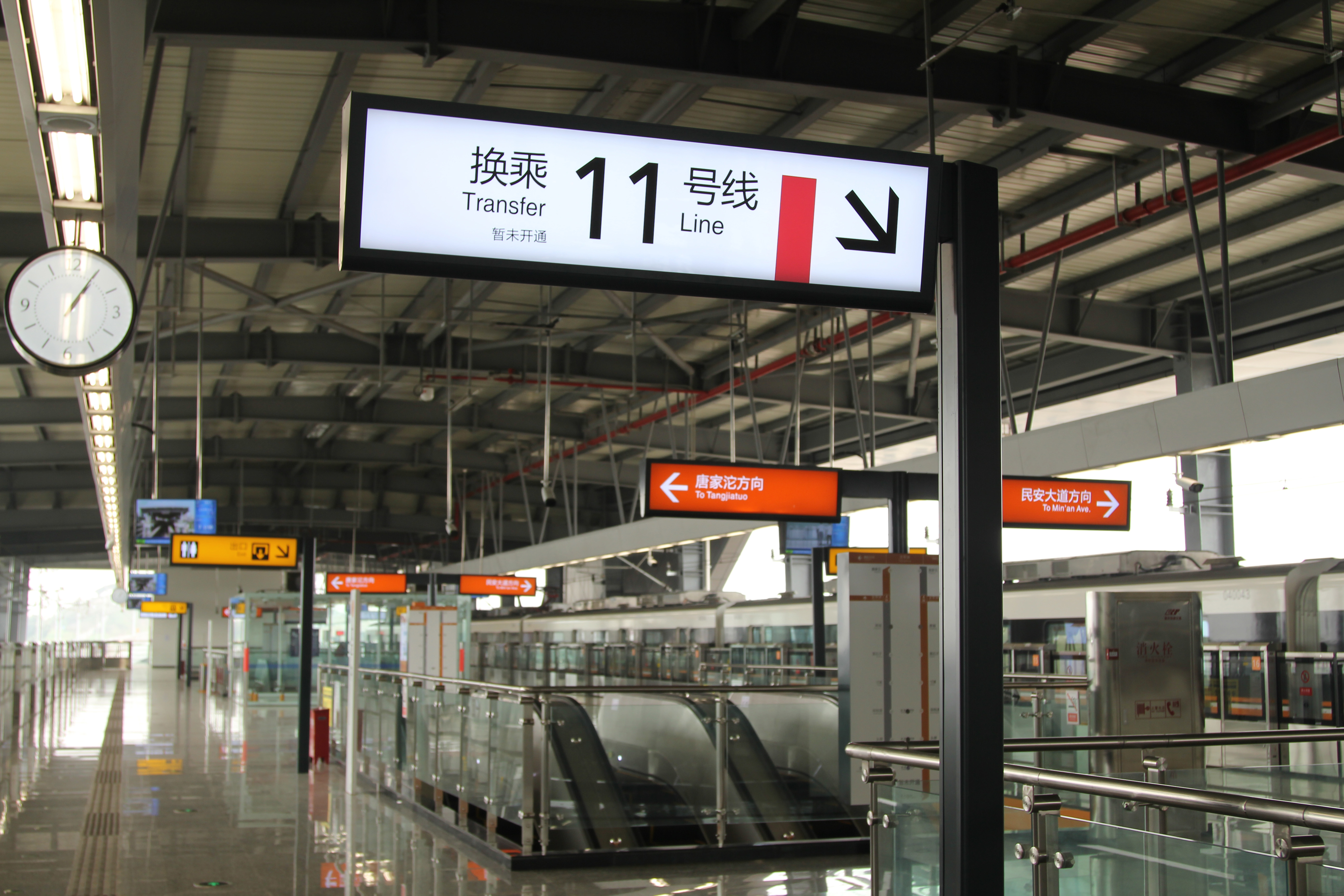 中文（中国大陆）: 太平冲站换乘标志